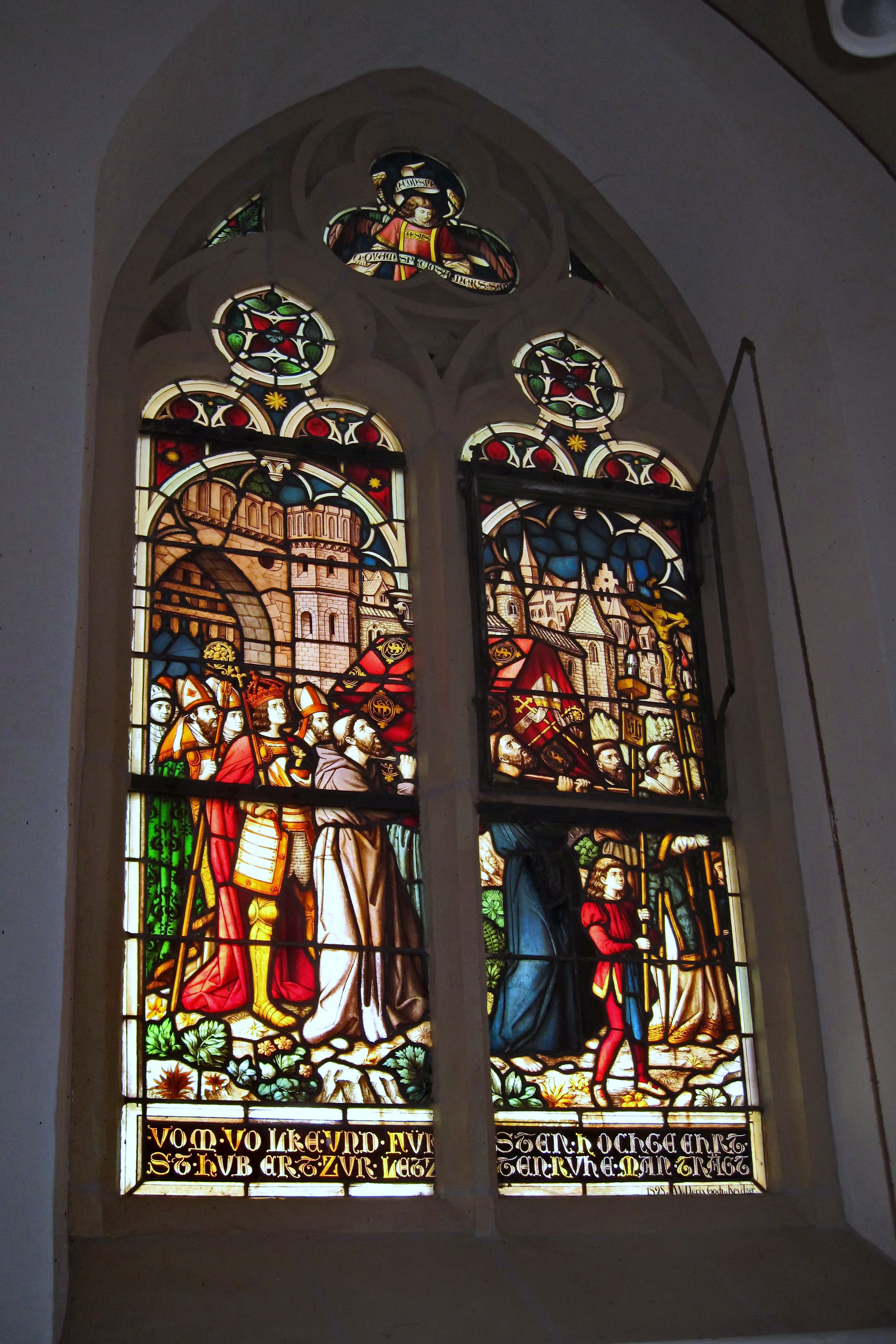 Kirchenfenster von Wilhelm Derix in der Kapelle St. Hubertus Keylaer (Ersterwähnung 1381) in Kevelaer, Hubertusstraße. This image shows a heritage building in Germany, located in the North Rhine-Westphalian city Kevelaer (no. A 173).